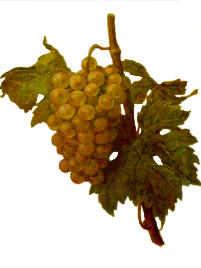 Grappe Prècoce de Malingre par Viala et Vermorel